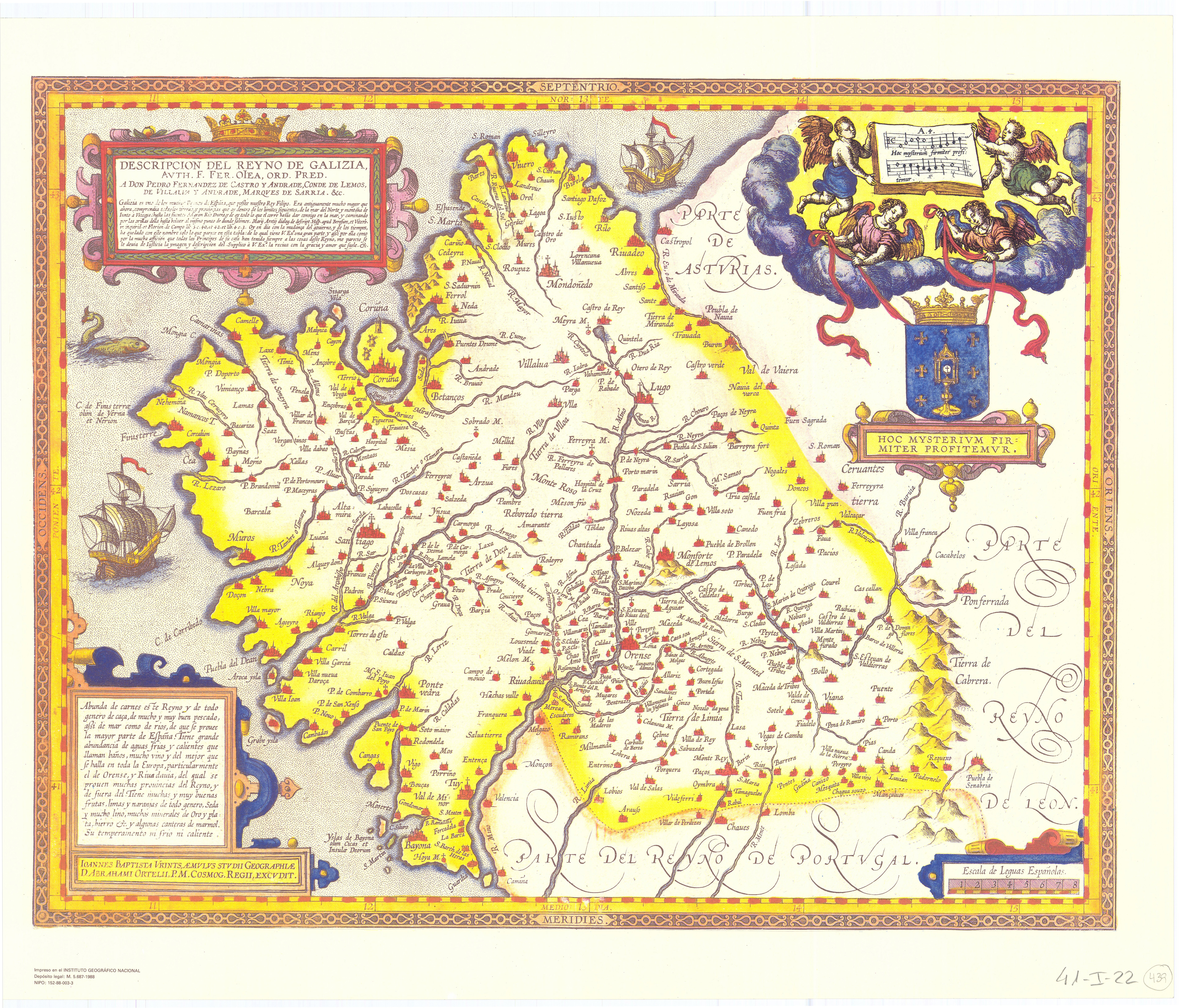 38 x 48 cm Transcription: DESCRIPCION DEL REYNO DE GALIZIA, AVTH.F.FER. OIEA ORD PRED. A DON FERNANDEZ DE CASTRO Y ANDRADE,CONDE DE LEMOS, DE VILLALVA Y ANDRADE, MARQVES DE SARRIA. &c. Galizia es vno de los muchos Reynos de España,que poßée nuestro Rey Filipo. Era antiguamente mucho mayor que ahora, comprendia todas las tierras y prouinçias que ay dentro los limites siguientes,de la mar del Norte y montaña de Iunto à Vizcaya, hasta las fuentes del gran Rio Duetro,y de ay todo loque el corre hasta dar consigo en la mar,y caminando por las orillas della hasta boluer al mismo punto de dunde salimos. Marij Aretij dialog.de descript.Hisp apud Berosum,et Viterb. in inquirid.et Florian.de Campo Lib.3.c.40,et42.et Lib.4.c.3. Oy en dia con la mudança del gouierno,y de los tiempos, ha quedado con este nombre solo lo que parece en esta tabla:de lo qual tiene V.Exª.vna gran parte.y aßí por ella como por la mucha afficion que todos los Principes de su casa han tenido siempre a las cosas deste Reyno, me parecio se le deuia de Iusticia la ymagen y descripcion del.Supplicio à V.Exª.la reciua con la gracia y amor que suele.&c. Abunda de carnes este Reyno de todo genere de caça,de mucho buen pescado, aßi de mar como de rios,de que se prouée la mayor parte de España.Tiene grande abundancia de aguas frias y calientes que llaman baños,mucho vino del mejor que se halla en toda Europa,particularmente el de Orense,y Riuadauia,del qual se prouen muchas prouincias del Reyno,y de fuera del.Tiene muchas y muy buenas frutas,limas y naranjas de todo genero,Seda y mucho lino,muchos minerales de Oro y pla: ta, hierro &c. Y algunas canteras de marmol. Su temperamento ni frio ni caliente. IOANNES BAPTISTA VRINTS, ÆMVLVS STUDII GEOGRAPHIÆ D.ABRAHAMI ORTELII, P.M.COSMOG.REGII EXCUDIT. HOC MYSTERIVM FIR: MITER PROFITEMVR.